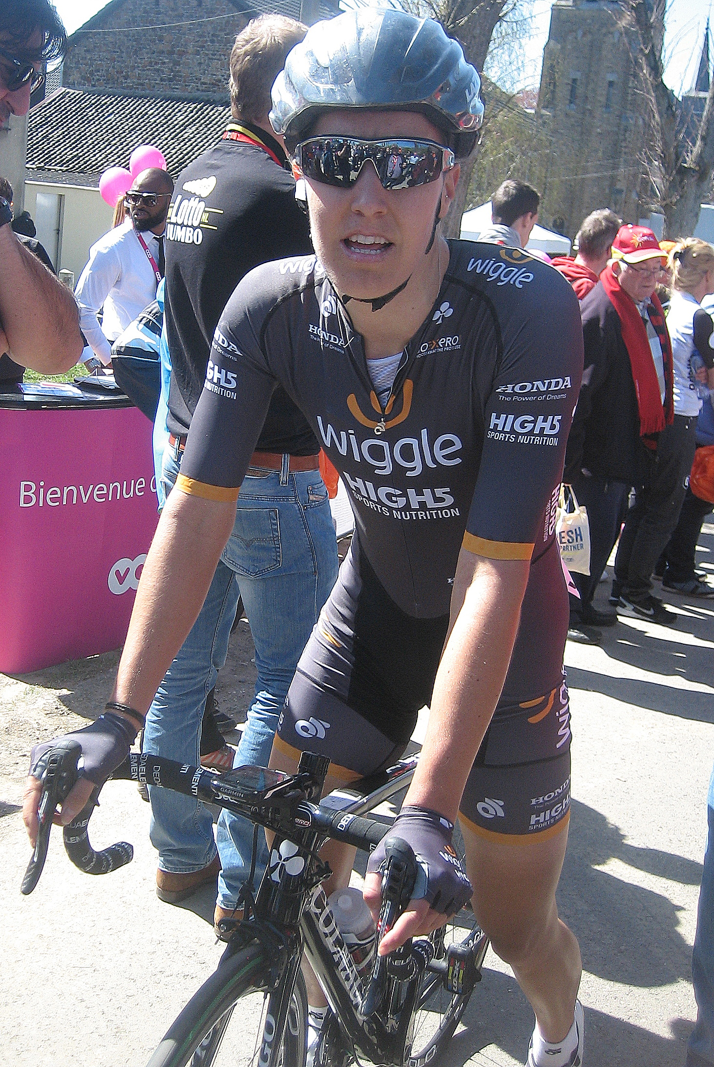 Dani King (Wiggle High5) na finish Waalse Pijl 2016